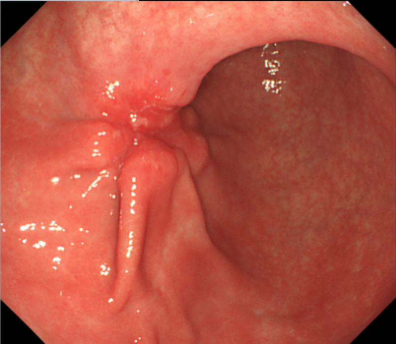 胃体中部前壁に発生した3型胃癌の内視鏡像。